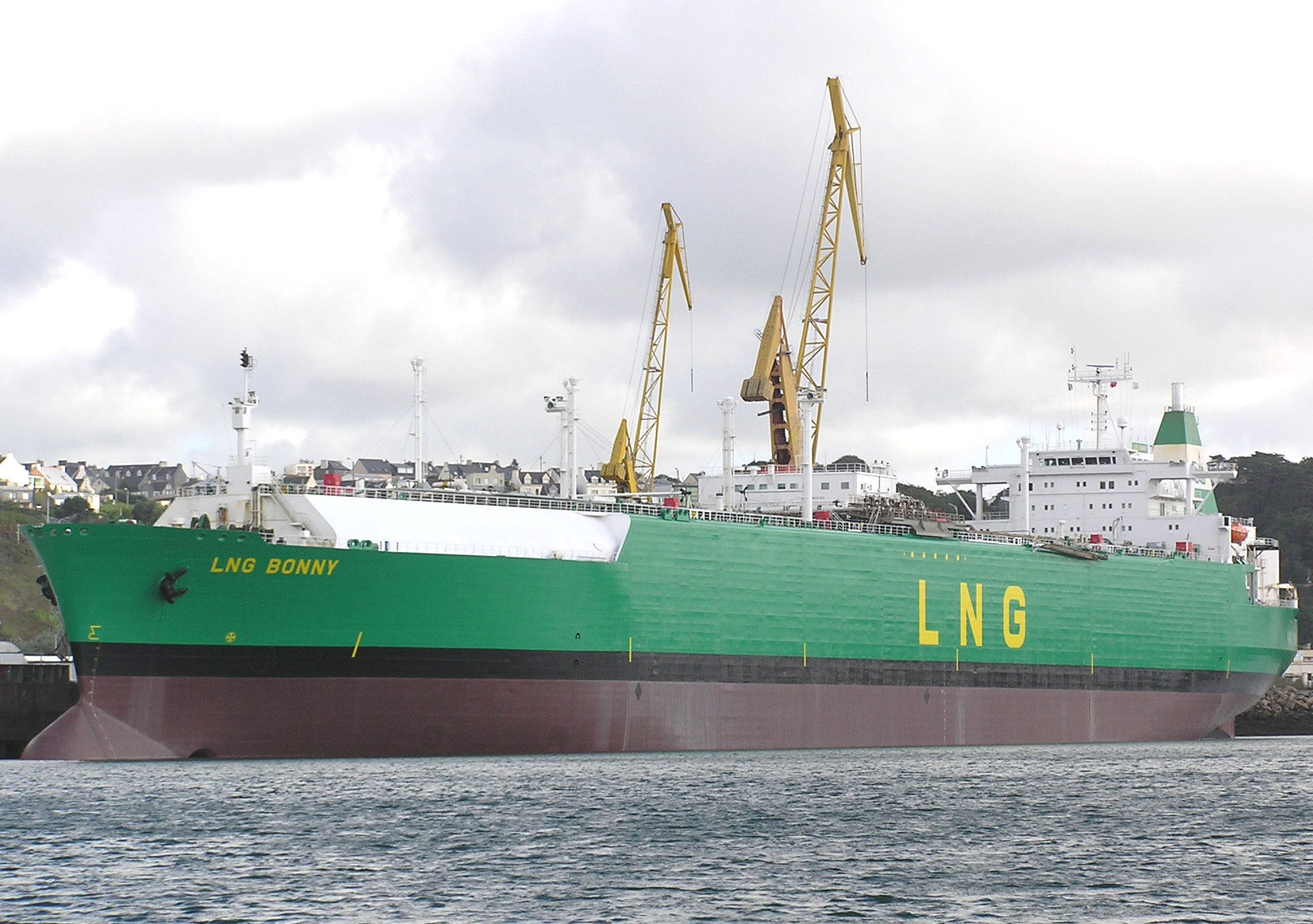 Le LNG BONNY à Brest lors d'un arrêt technique réalisé au chantier de réparation de la Sobrena; Caractéristiques principales : Longueur 286,85 m Largeur 41,84 m Port en lourd : 71 472 t Capacité : 132 588 m3 Tirant d' eau 11,22 m Puissance 30 000 kW (Turbines, 1 hélice) Vitesse 20 nds Pavillon des Bermudes 5 Cuves de stockage (procédé Gaz Transport) Année de construction : 1981 Chantier de construction : Kockums (Suède)) Possédé par Bonny Gas Transport Ltd (Nigéria) Affrété par Shell International Trading & Shipping Cy Ltd sur la route Nigéria - Europe